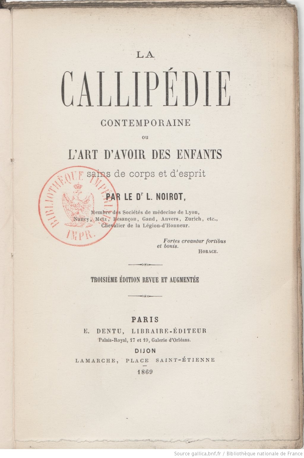 La callipédie contemporaine, 3e édition, un essai eugéniste publié par le Dr Louis Noirot, 3e édition de 1869